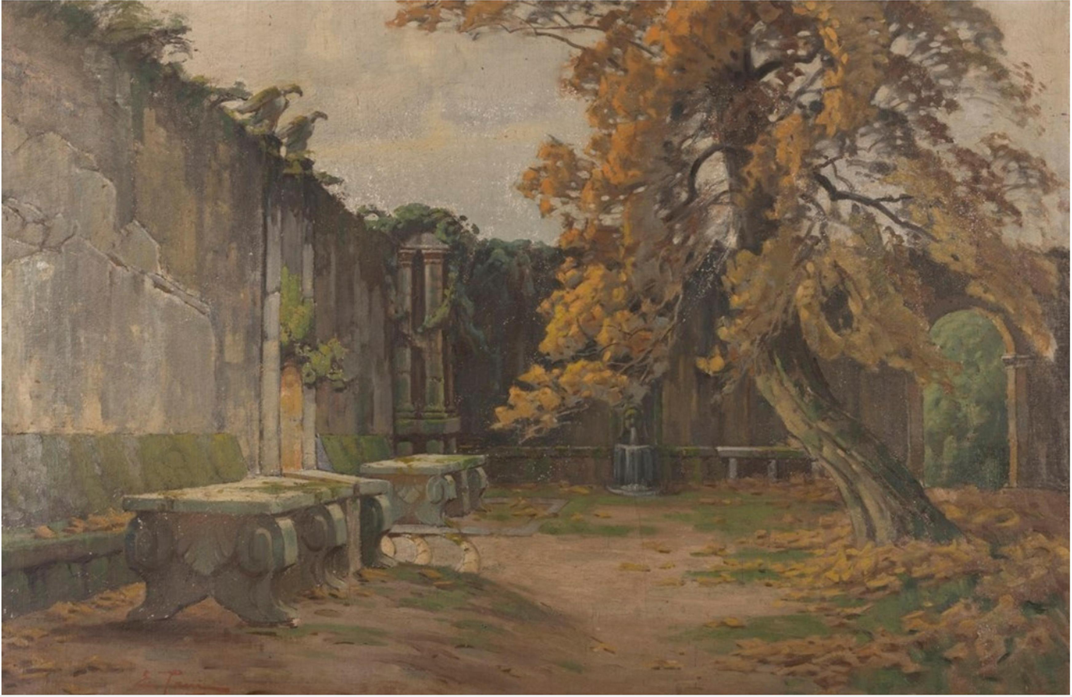 Viene effigiato un particolare del piazzale della fontana dell'Ovato della Villa d'Este a Tivoli, un angolo che già fu ripreso, pur con altra visuale, da Jean-Honoré Fragonard (1732-1806) con l'opera la "Mosca cieca", del Timken Museum of Art di San Diego in California, che inquadra la cosiddetta "Regina delle Fontane" o "Fontana di Tivoli" con uno dei platani del piazzale in primo piano. [Roberto Borgia, Tivoli, 22 giugno 2020]